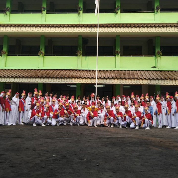 17 Agustus 2019